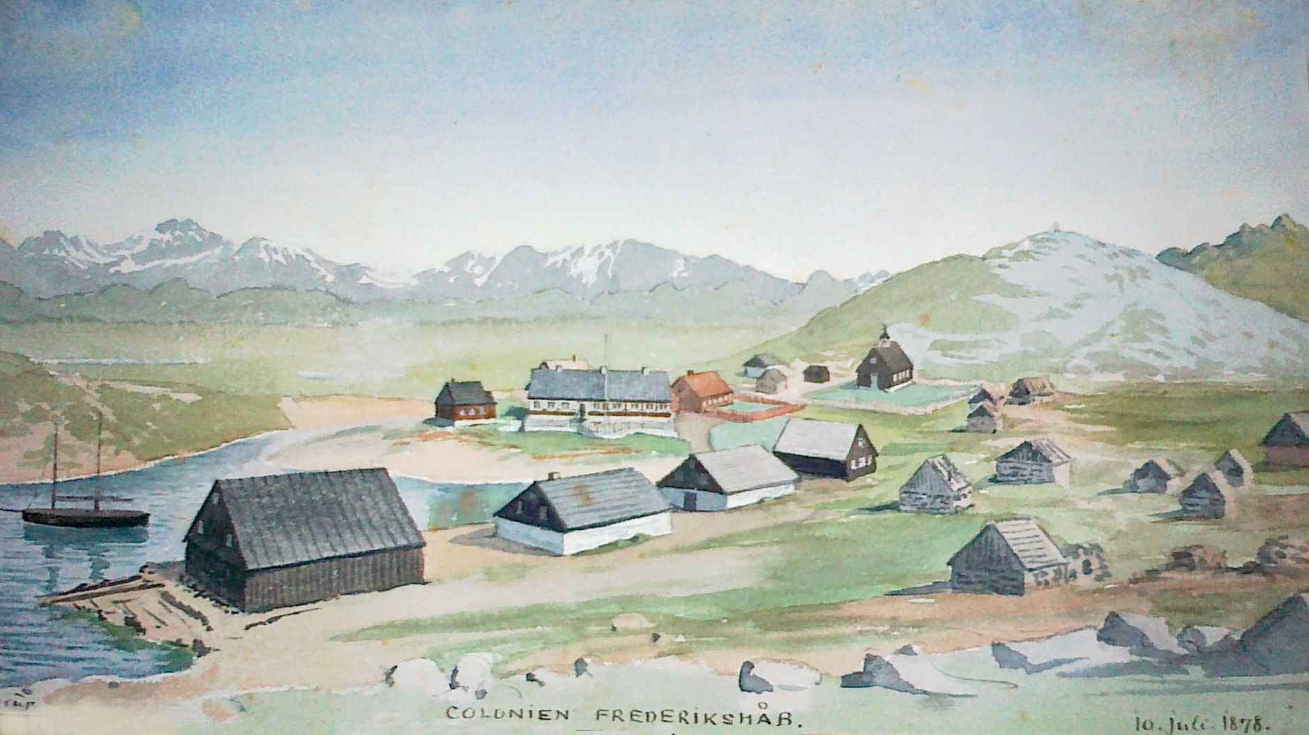 "Colonien Frederikshaab". På tegningen ses proviantbod, skolehus, bestyrerbolig og kirke. Tegning af Andreas Kornerup, 10. juli 1878.